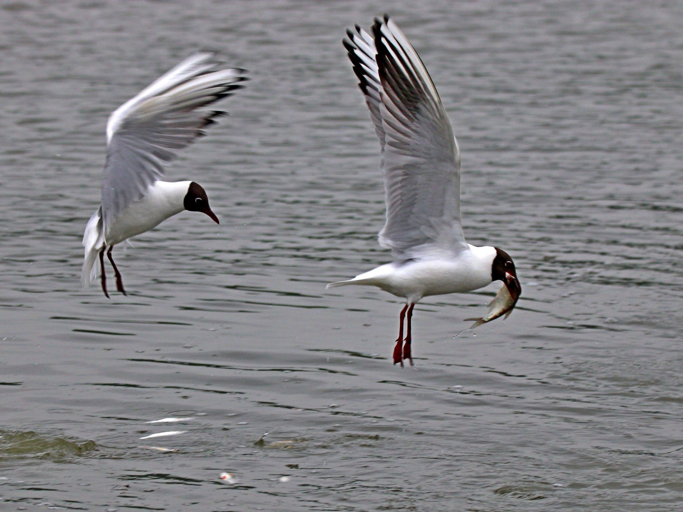 Lachmöwen